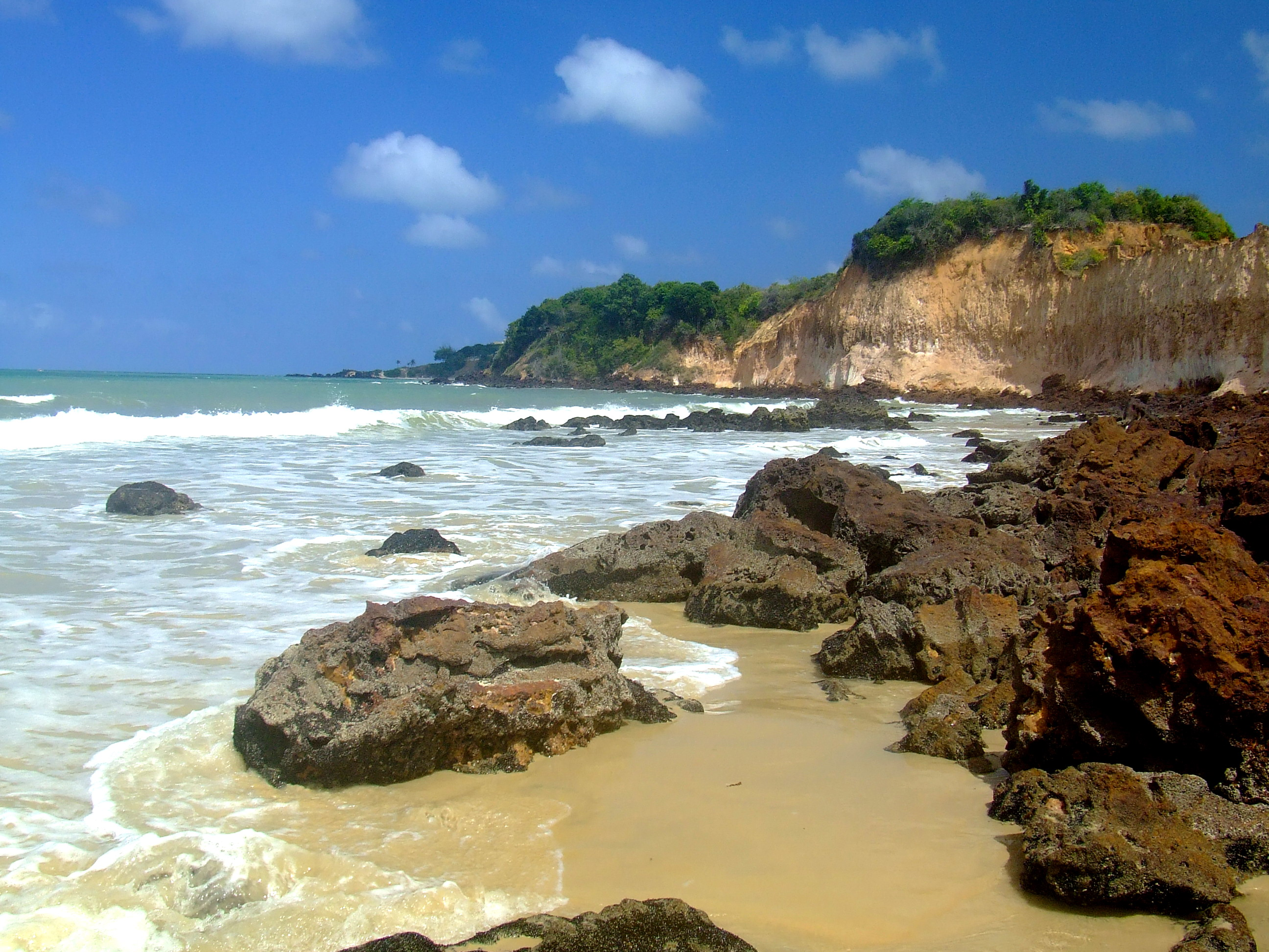 Praia de Cotovelo em Parnamirim, próximo a Natal, Rio Grande do Norte, Brasil. Cotovelo Beach in Parnamirim, next the Natal, Rio Grande do Norte, Brazil.